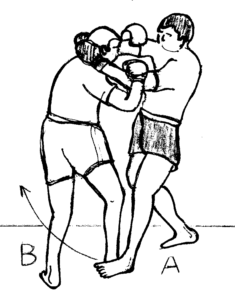 balayage_cuillère_externe.jpg